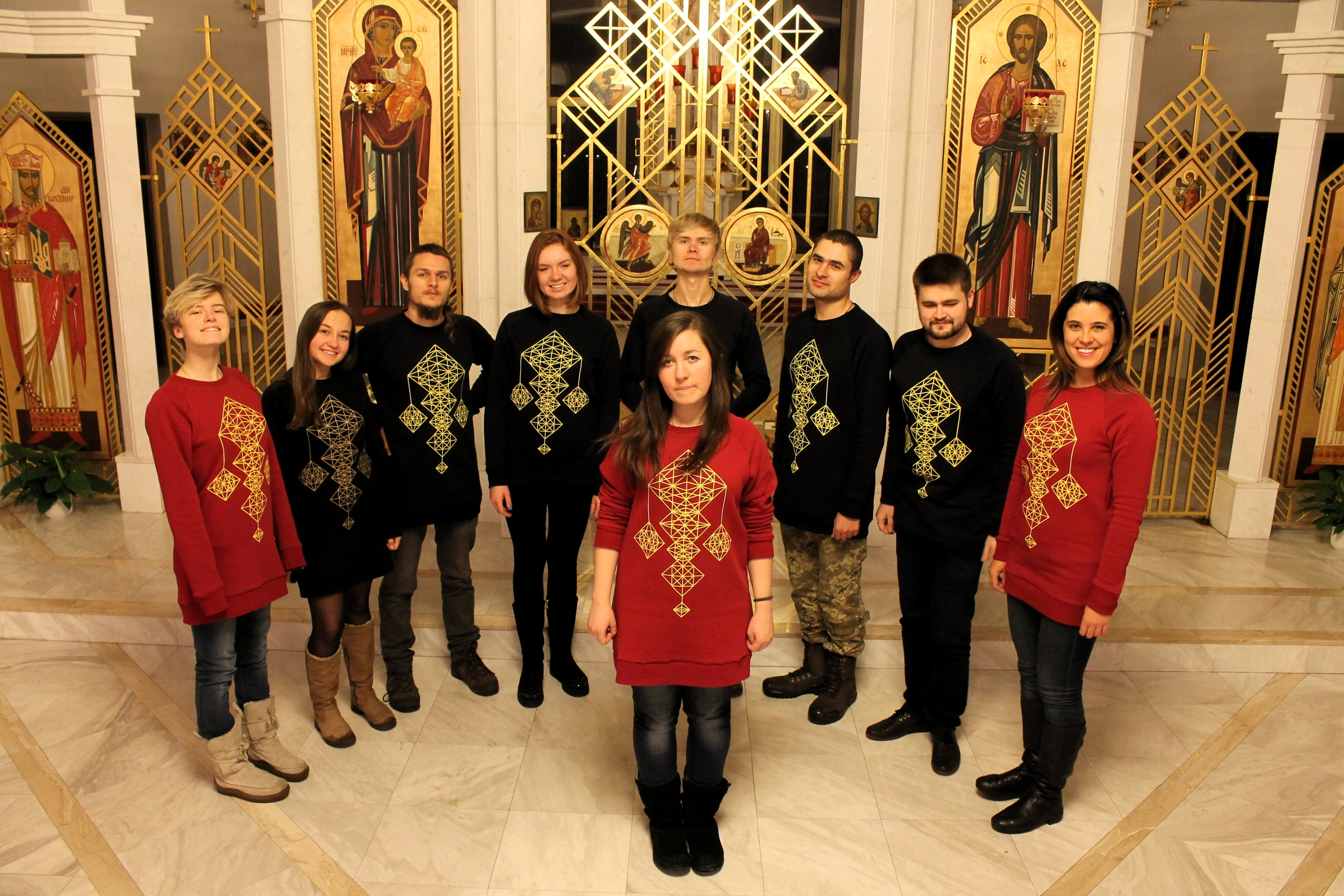 "Маленький хор..." у київському василіянському храмі